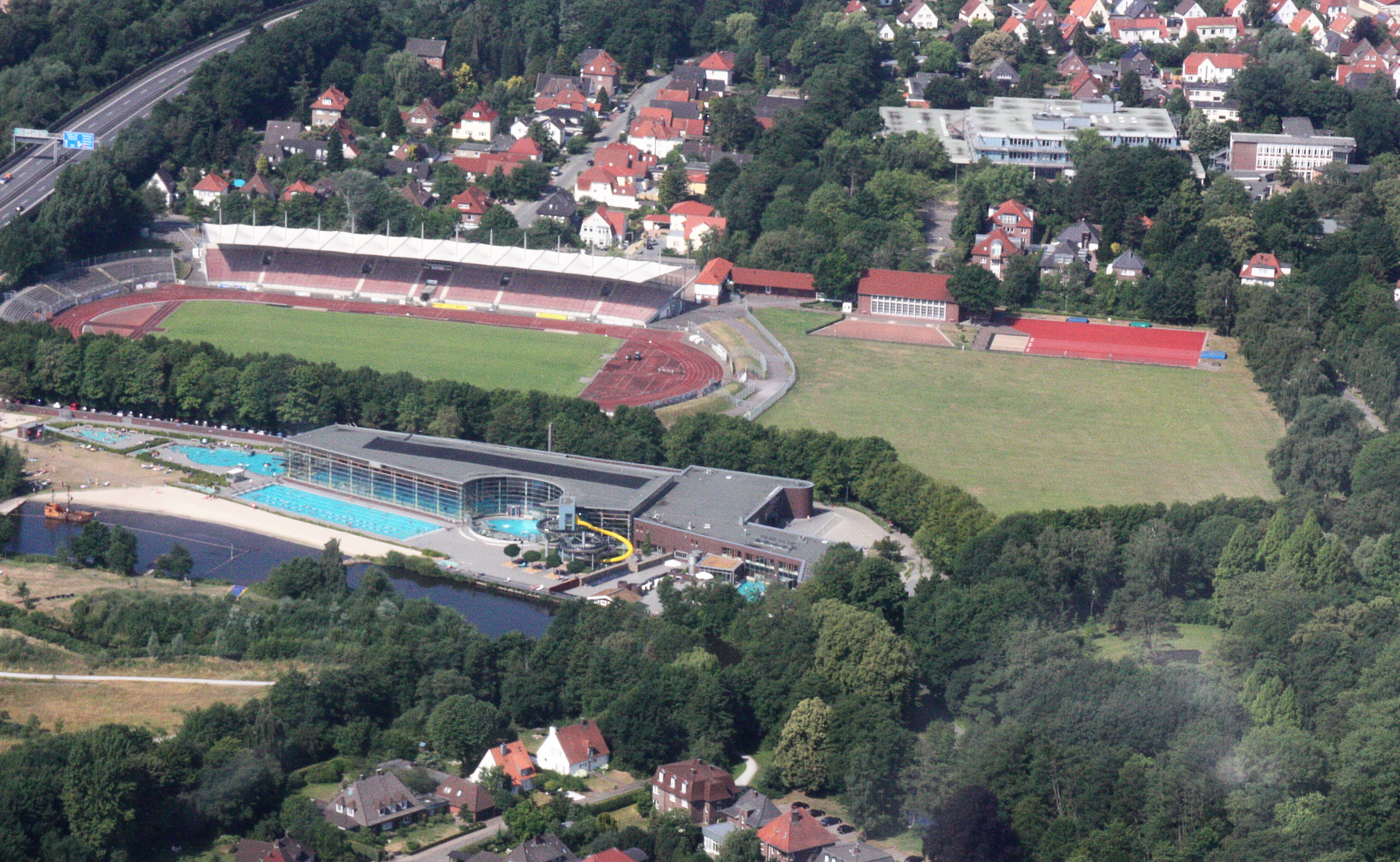 Luftaufnahmen Oldenburg (Oldenburg), mit Weiterflug nach Westen; 1500 Fuß Flughöhe; Juli 2010; Originalfoto bearbeitet: Tonwertkorrektur und Bild geschärft mit Hochpassfilter